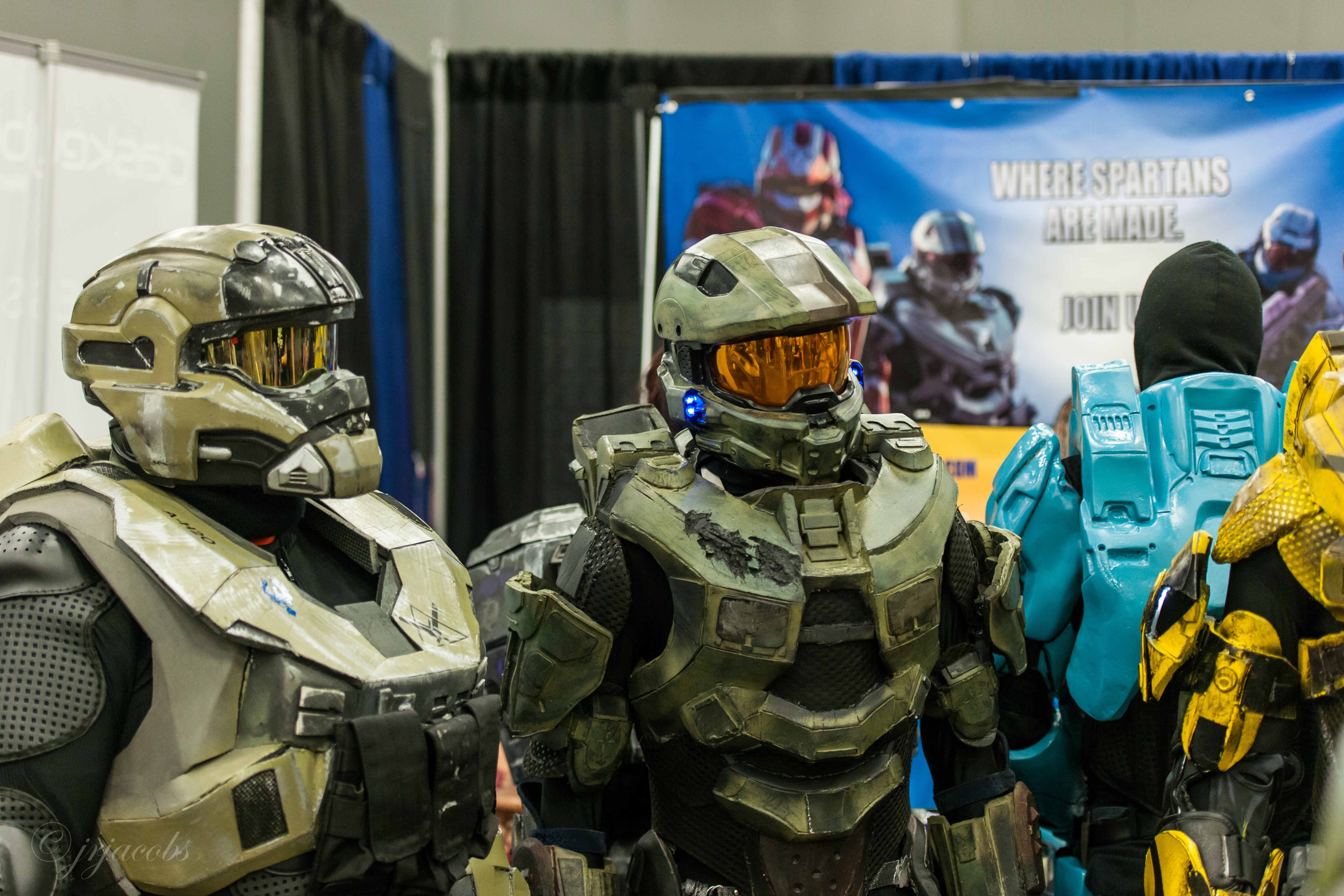 Halo spartan cosplay. Taken at RTX 2013.